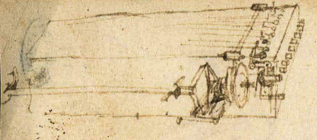 Viola organista